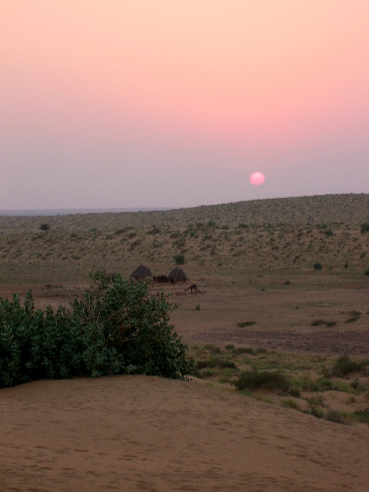 India del nord, il grande deserto del Thar